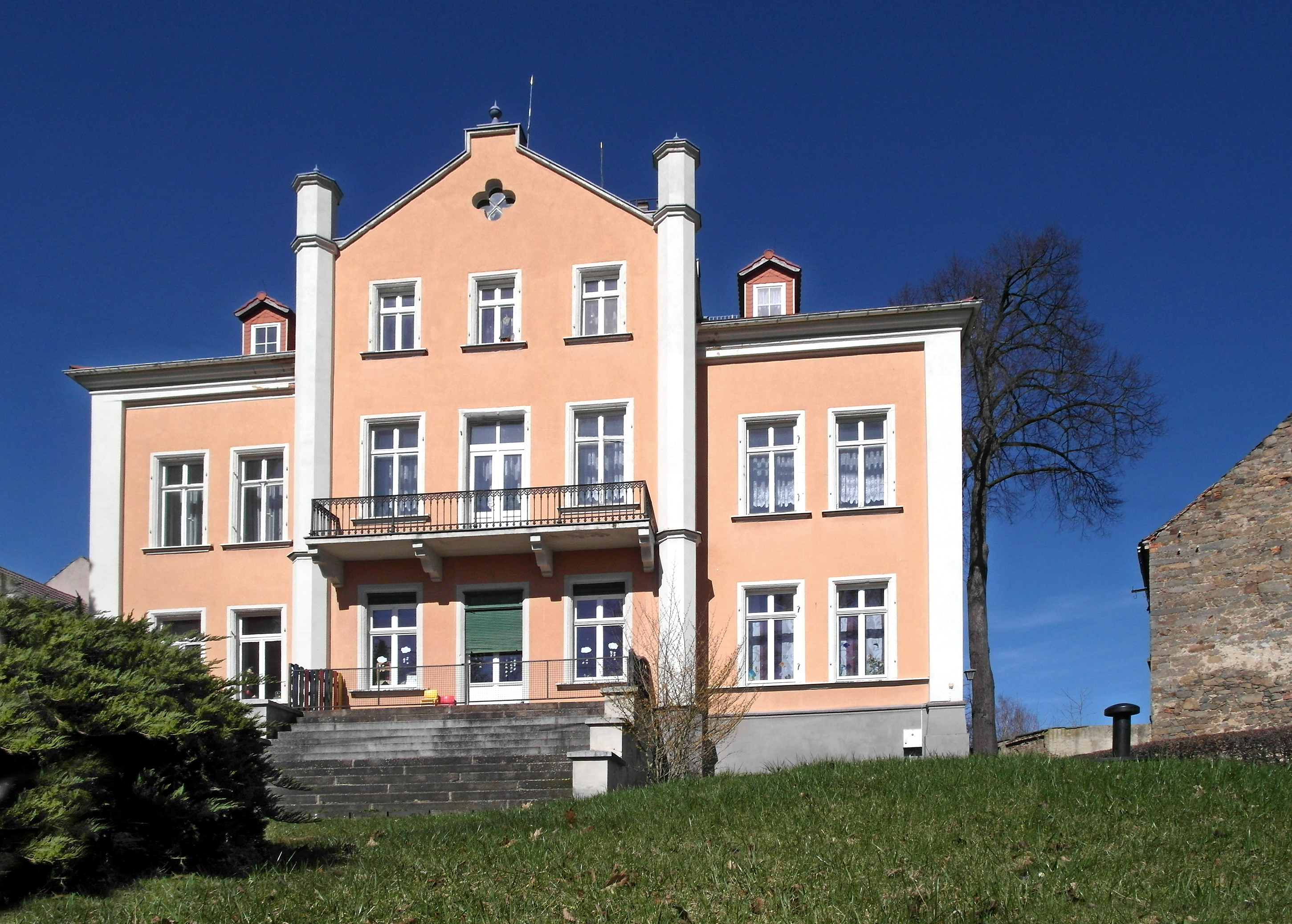 26.03.2017 02708 Ottenhain (Kottmar), Am Gemeindeamt: Schloß Niederottenhain (letztes Viertel 19. Jh.), vermutlich unter Carl Oskar Freiherr von Friesen errichtet, später in bürgerlichen Händen. In der DDR Gemeindebesitz. Heute Gemeindeverwaltung und Kindergarten. Sicht von Süden. [SAM8677.JPG]20170326235DR.JPG(c)Blobelt